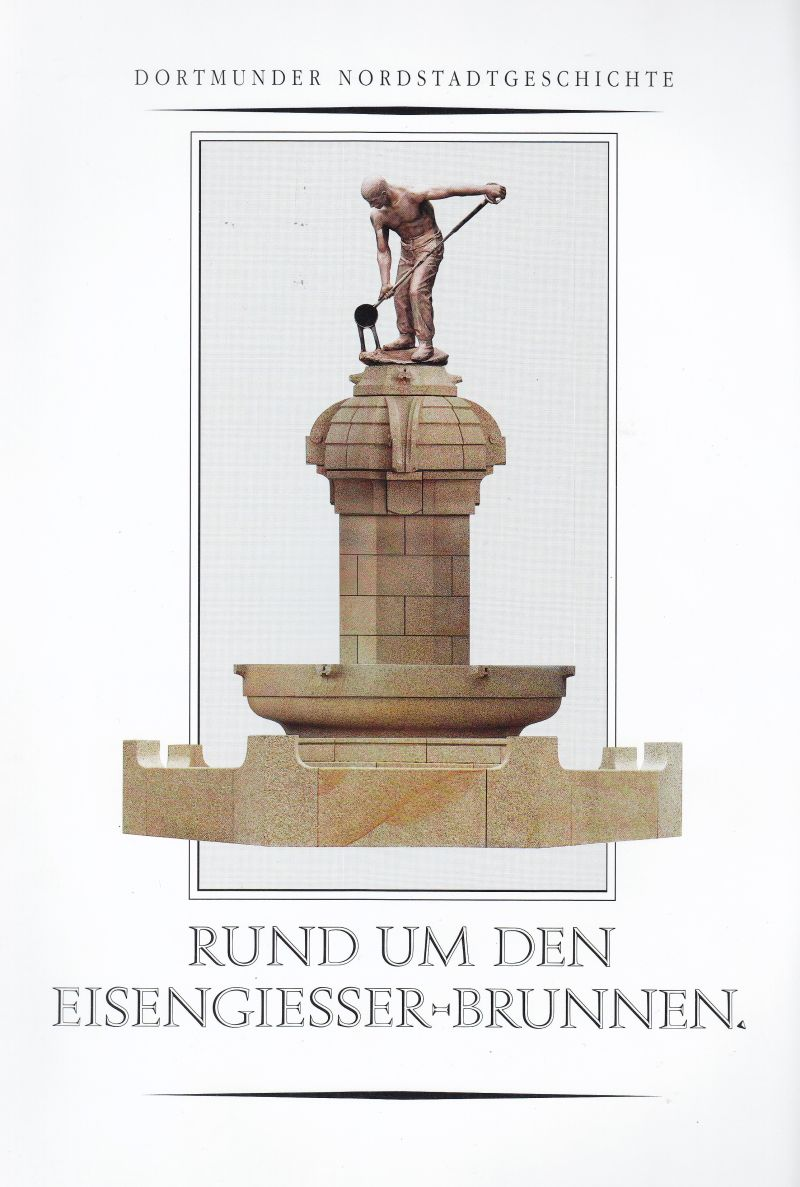 Titelseite Broschüre "Eisengießer-Brunnen"